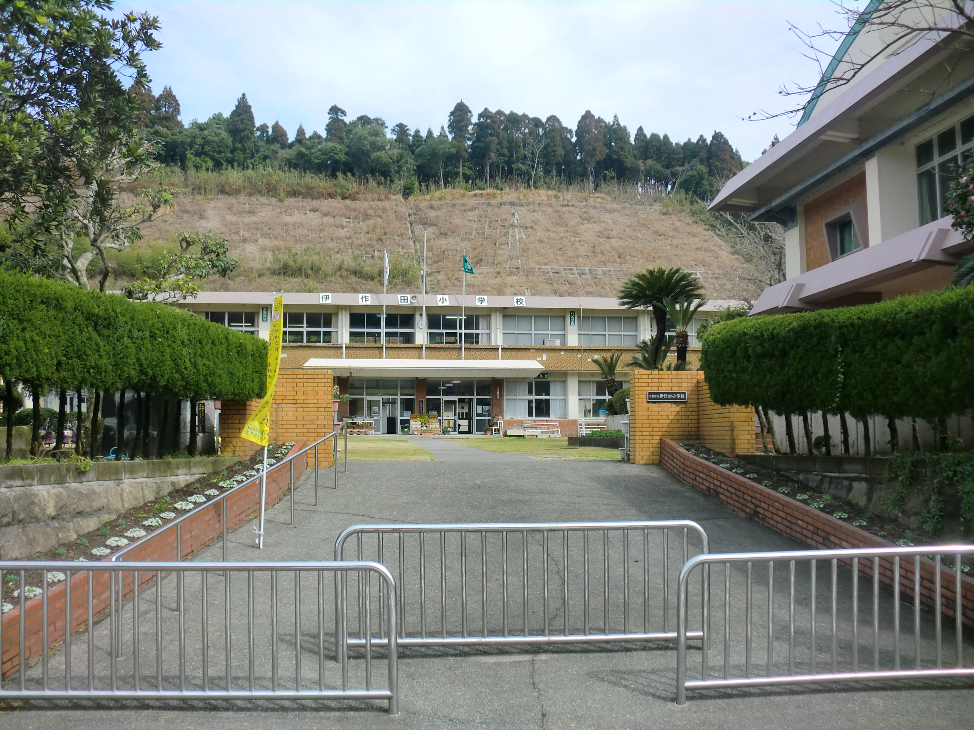 日置市にある日置市立伊作田（いざくだ）小学校